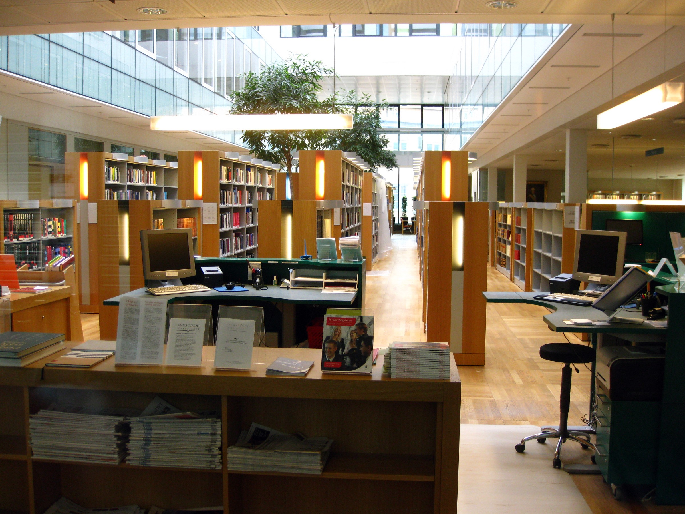 Anna Lindh-biblioteket på Campus Valhallavägen i Stockholm.